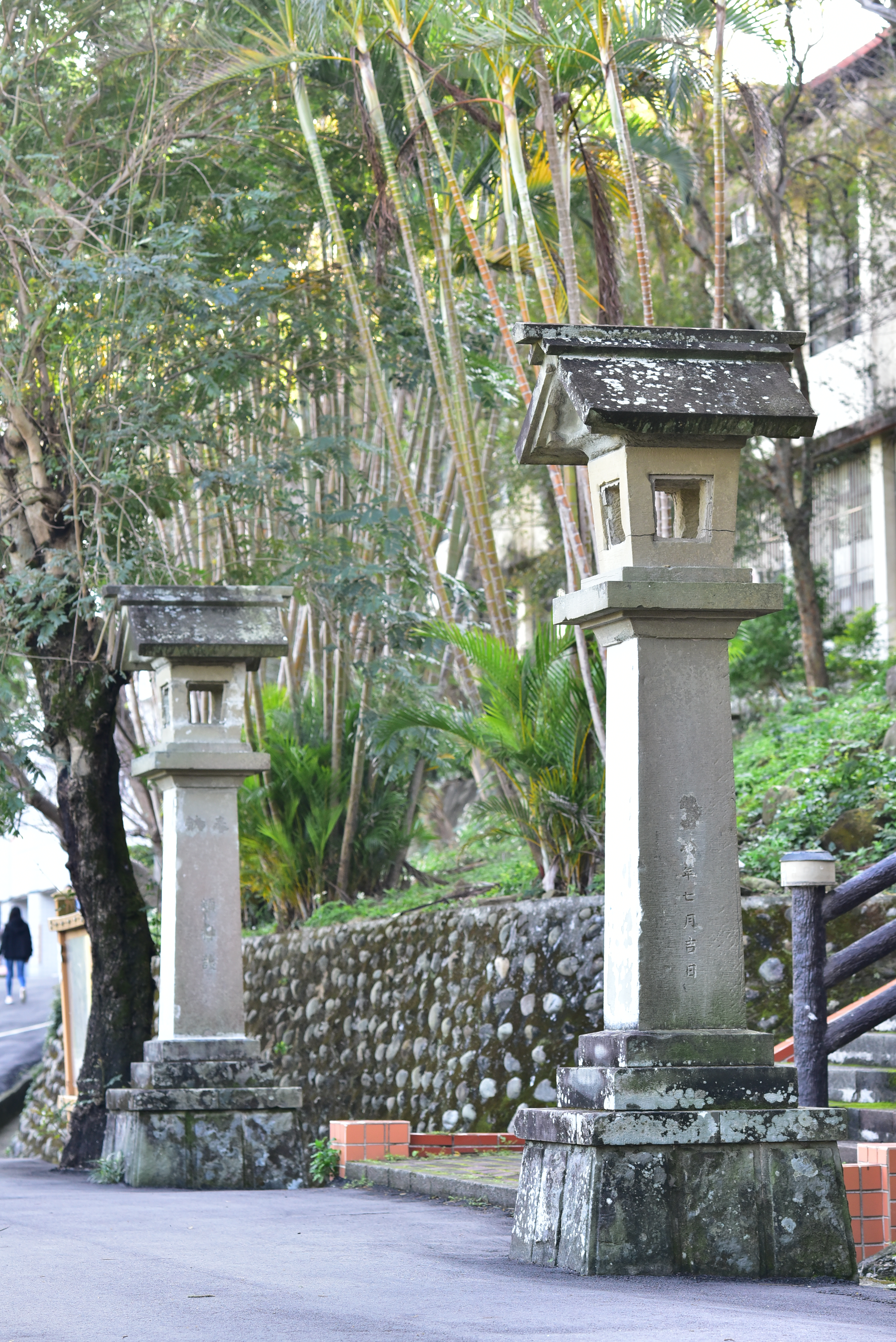 2017員崠國小員崠山神社石燈籠